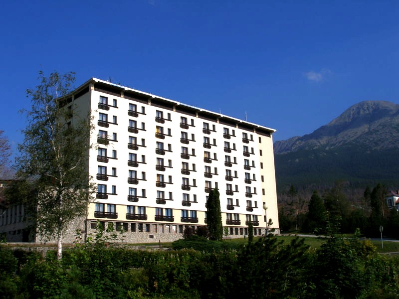 Hotel Tatranské Zruby. Mesto Vysoké Tatry. Slovakia